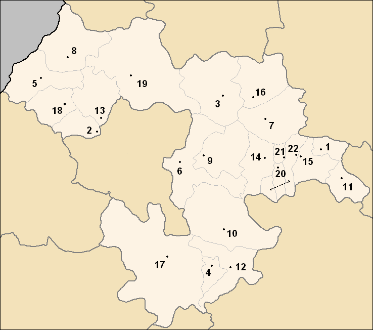 Sujet : carte des obchtini (municipalités) de l'oblast de Sofia (« non urbain »), en Bulgarie Auteurs : Потребител:Ljubo (Любомир Таушанов = Lyoubomir Taouchanov), pour la version originale en bulgare, Utilisateur:Hégésippe Cormier, pour l'adaptation française (repères chiffrés = lien entre deux parties séparées d'une obchtina) Source : Картинка:Sofia Oblast map.PNG (22 mai 2005) Licence